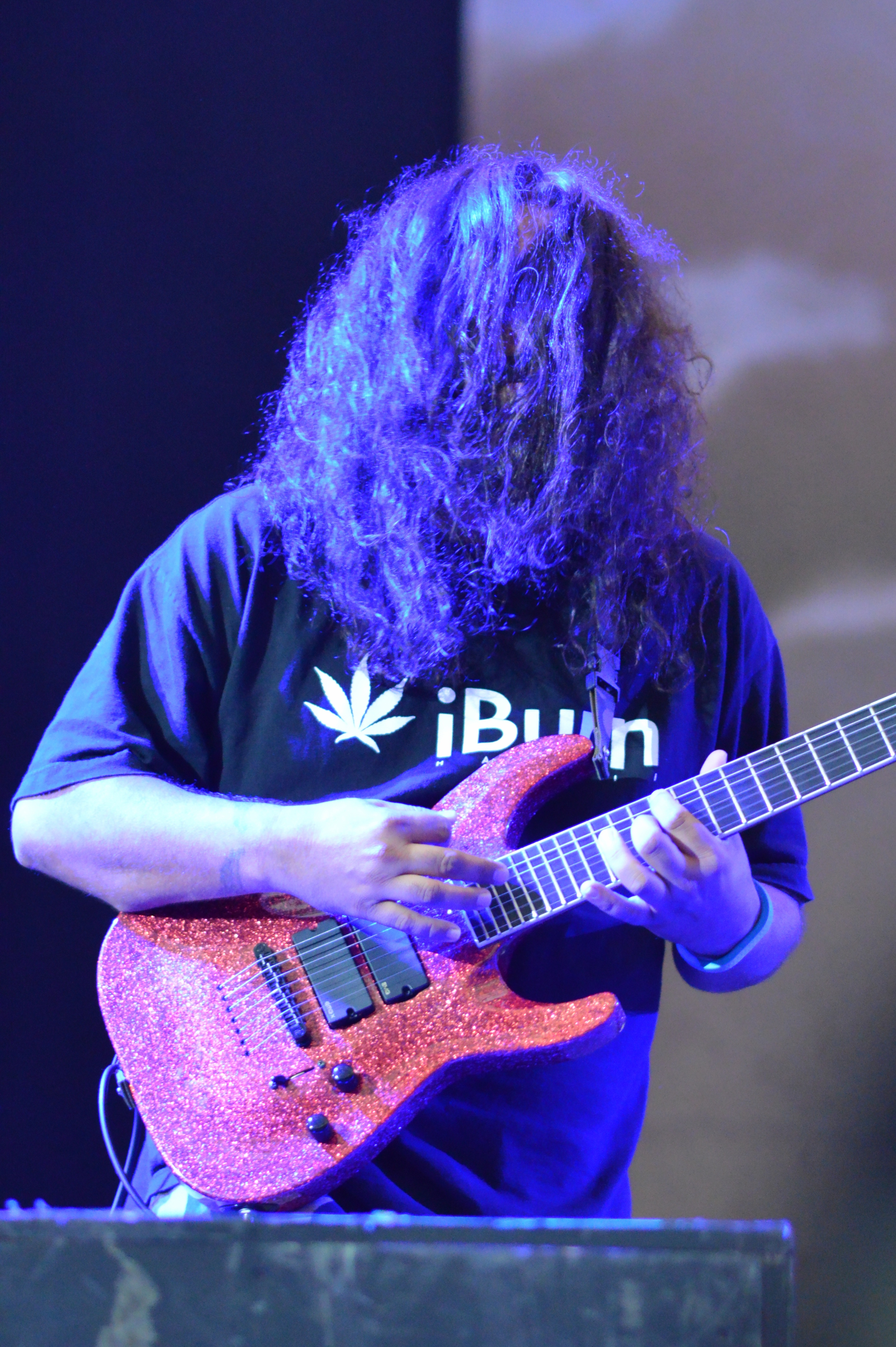 Deftones bei Rock im Pott 2013